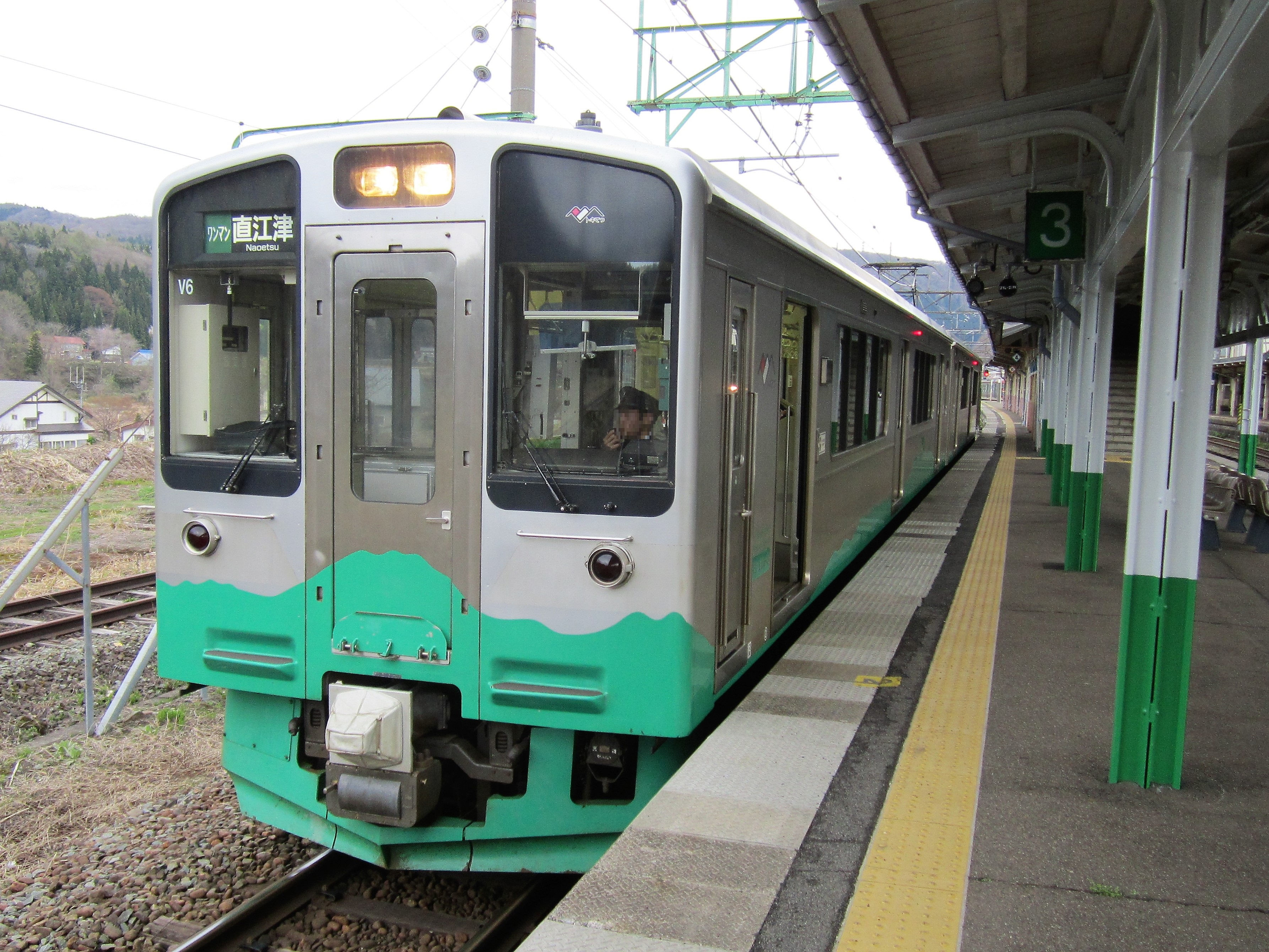 妙高高原駅に停車中のえちごトキめき鉄道V6編成ET126-6 Canon PowerShot A2200